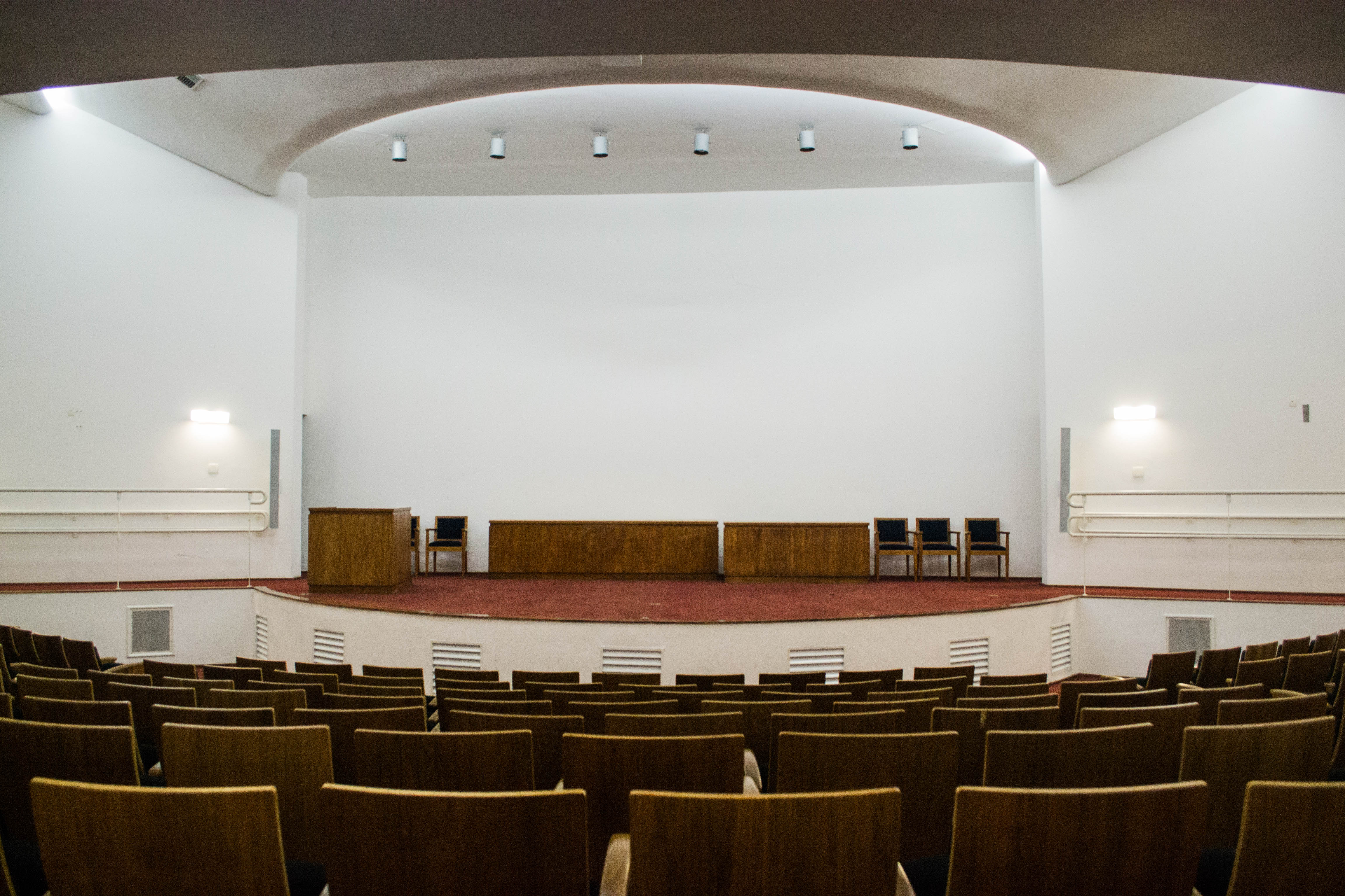 Auditório da Academia Paulista de Letras.